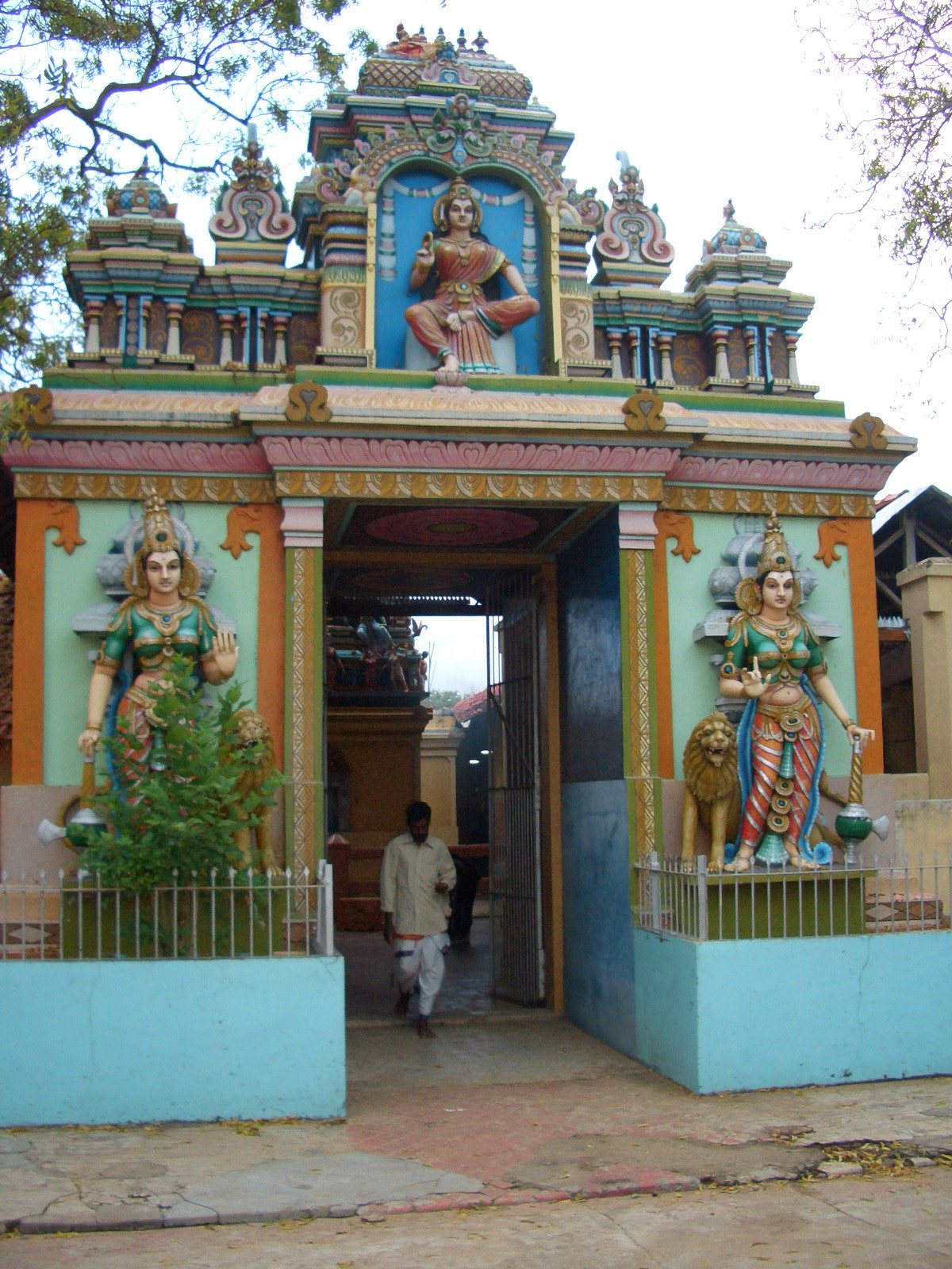 இலங்கை முல்லைத்தீவு வற்றாப்பளை அம்மன் கோயிலின் பிற்கோபுரத் தோற்றம்